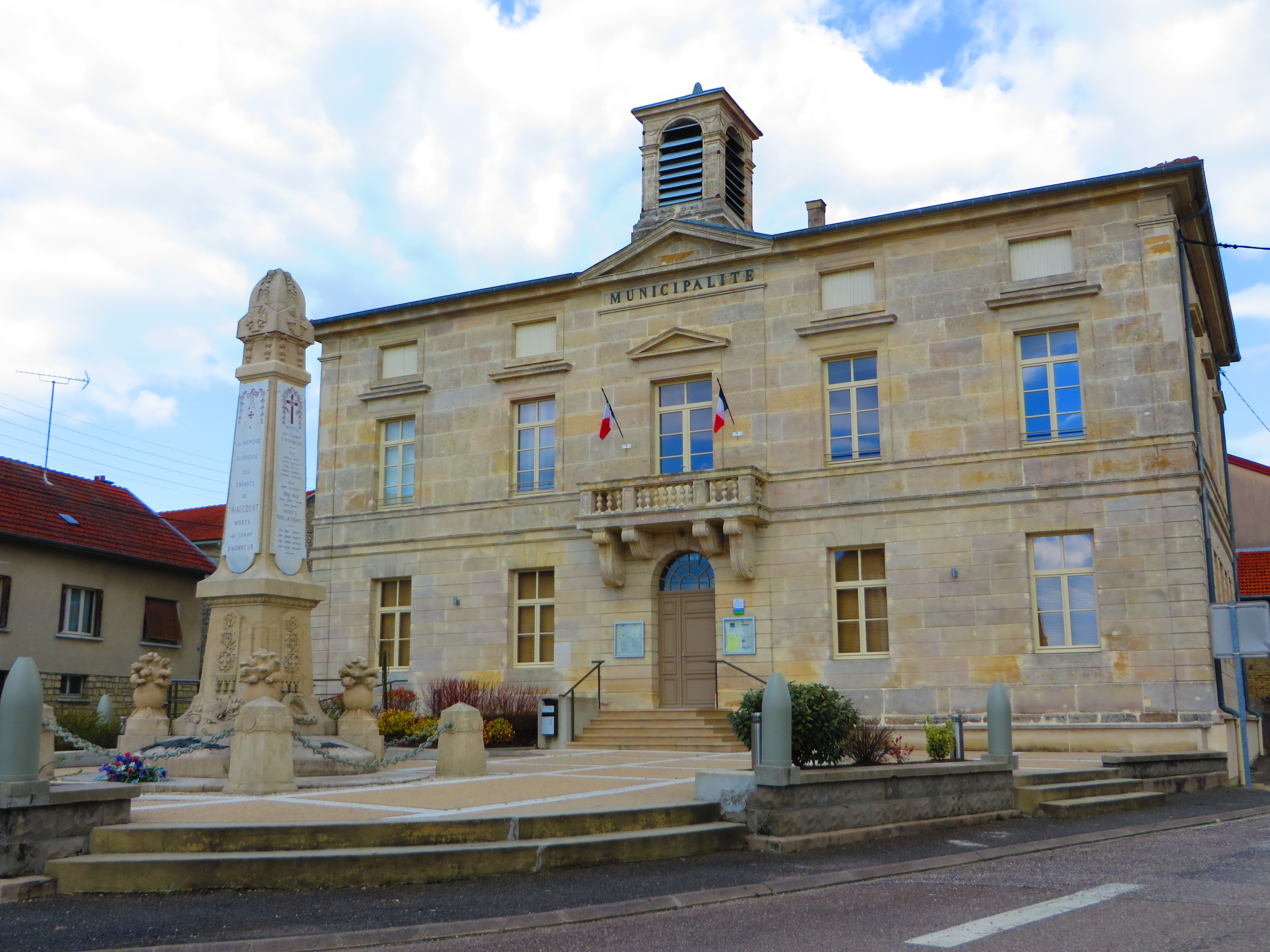 Seuil-d'Argonne La mairie